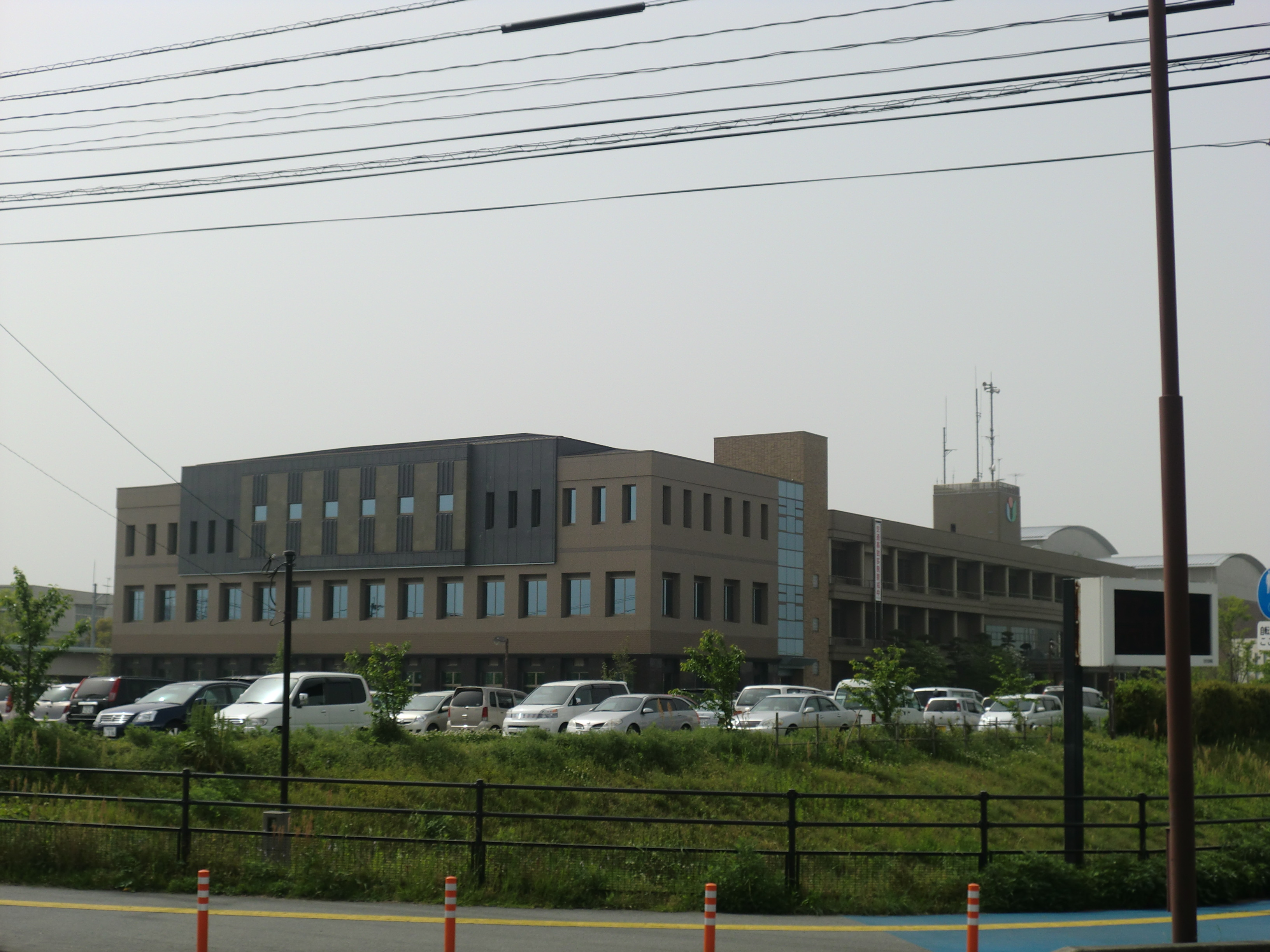 熊本県宇城市にある宇城市役所